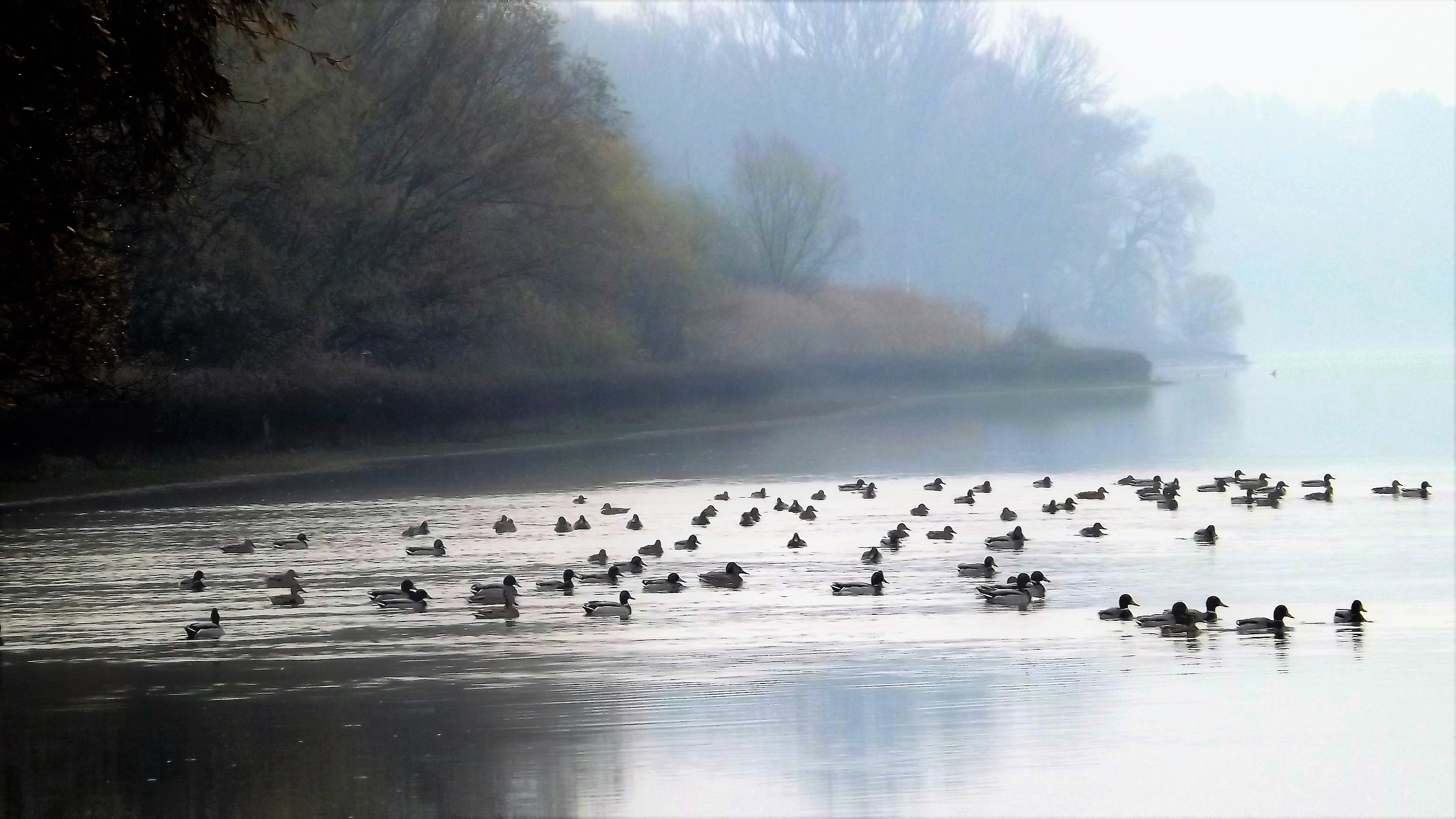 tőkésrécék a Dunán, Verőce